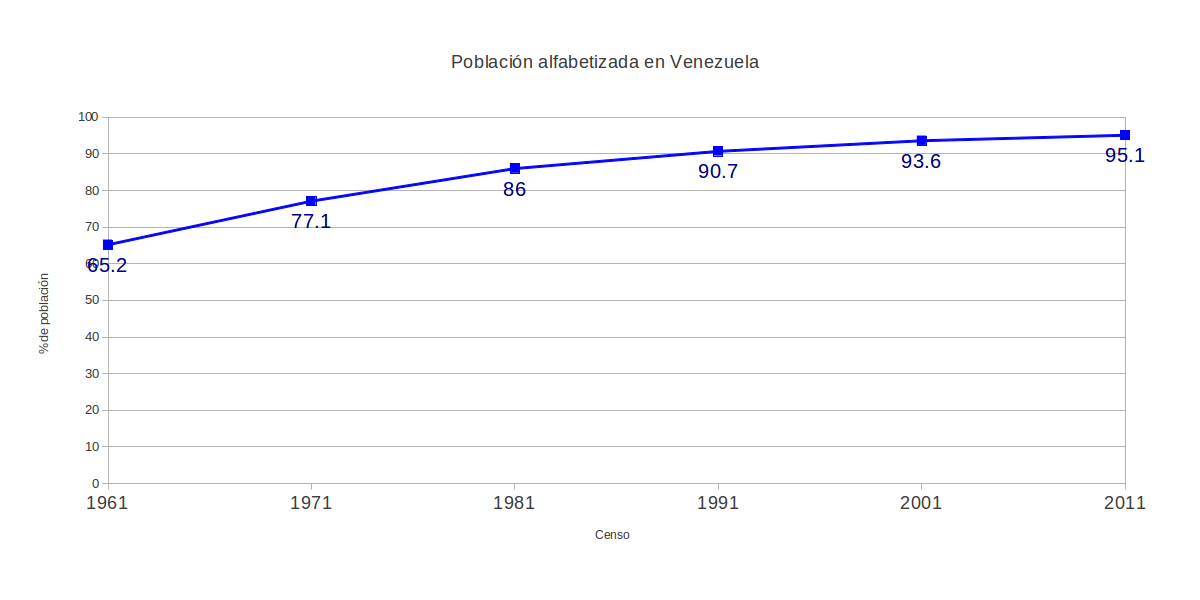 Alfabetización en Venezuela